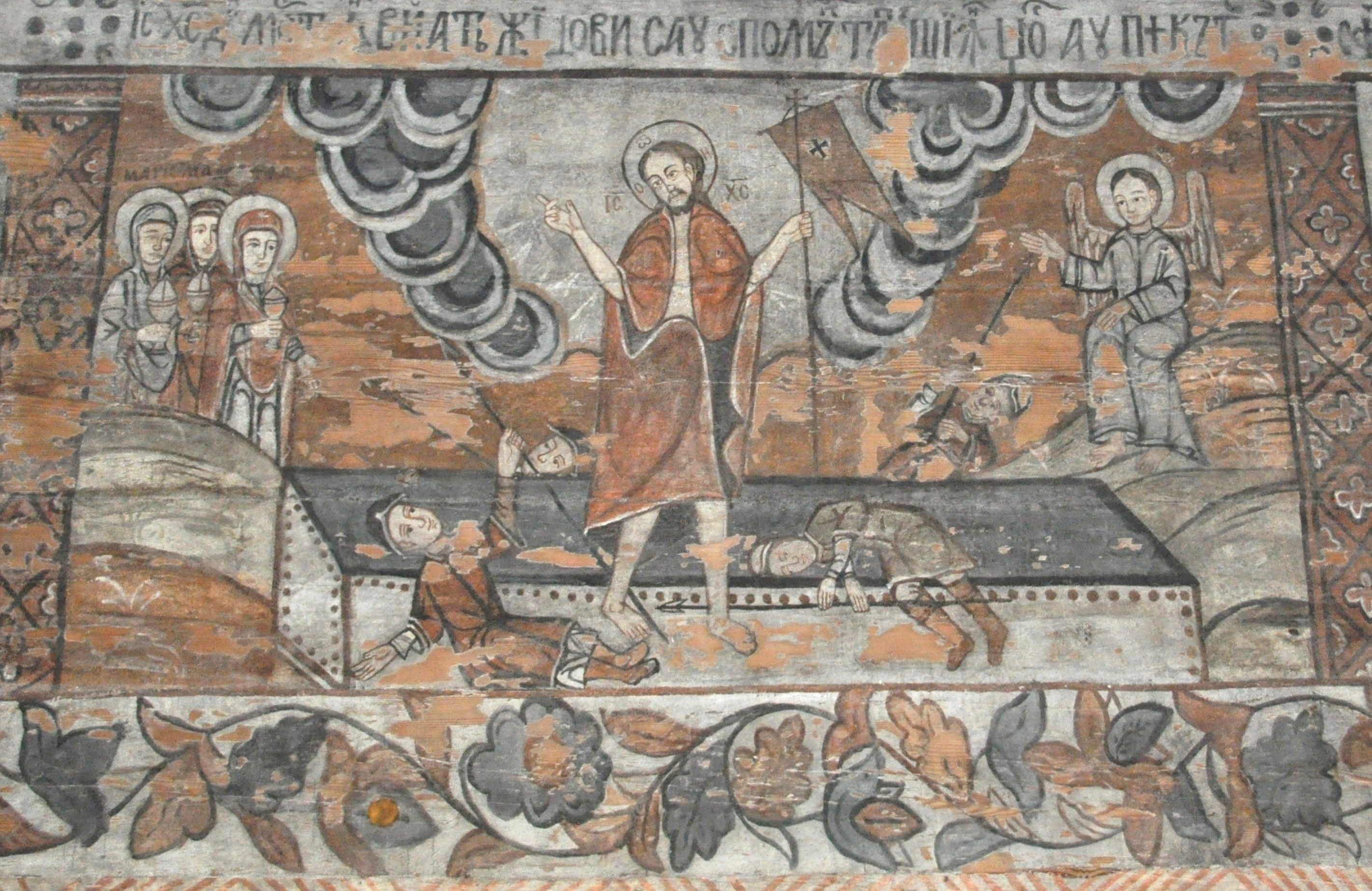 Biserica de lemn "Naşterea Maicii Domnului", sat IEUD